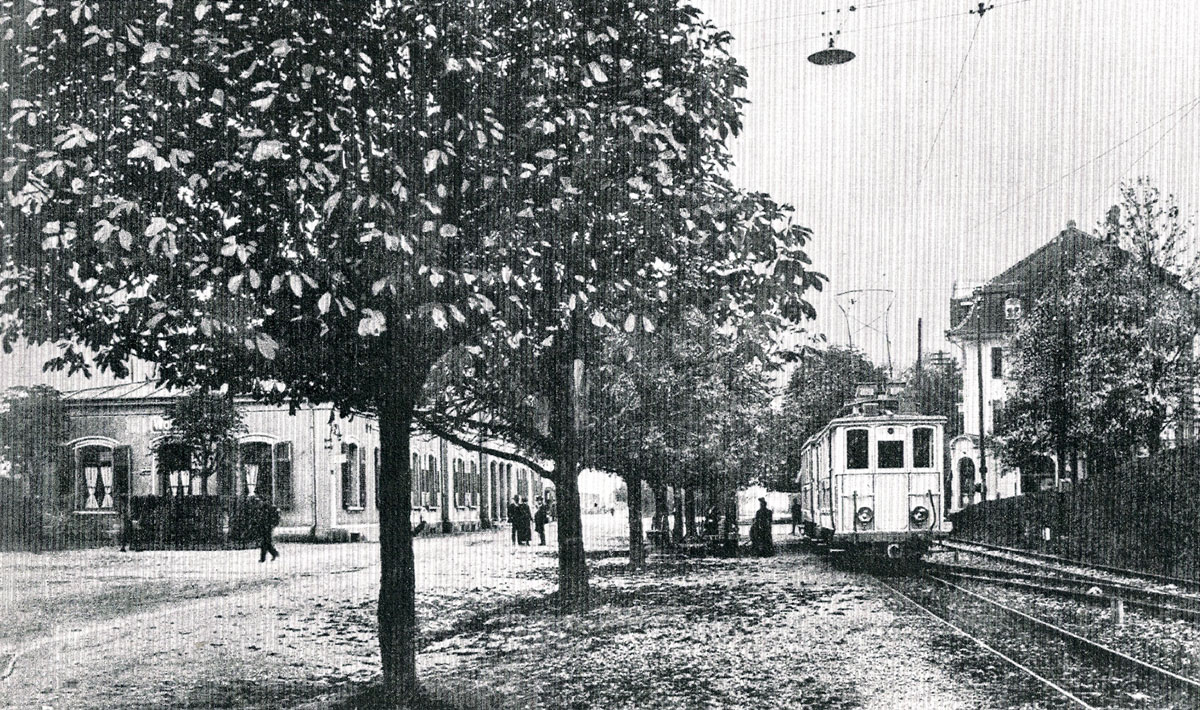 Endhaltestelle der Bremgarten-Dietikon-Bahn in Wohlen. links das Bahnhofsgebäude der SBB